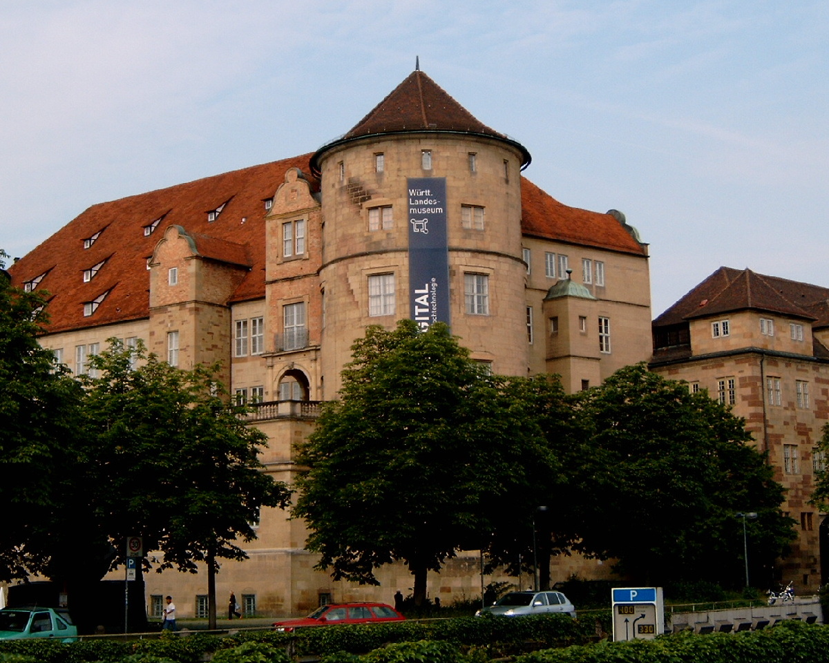 Altes Schloss Stuttgart